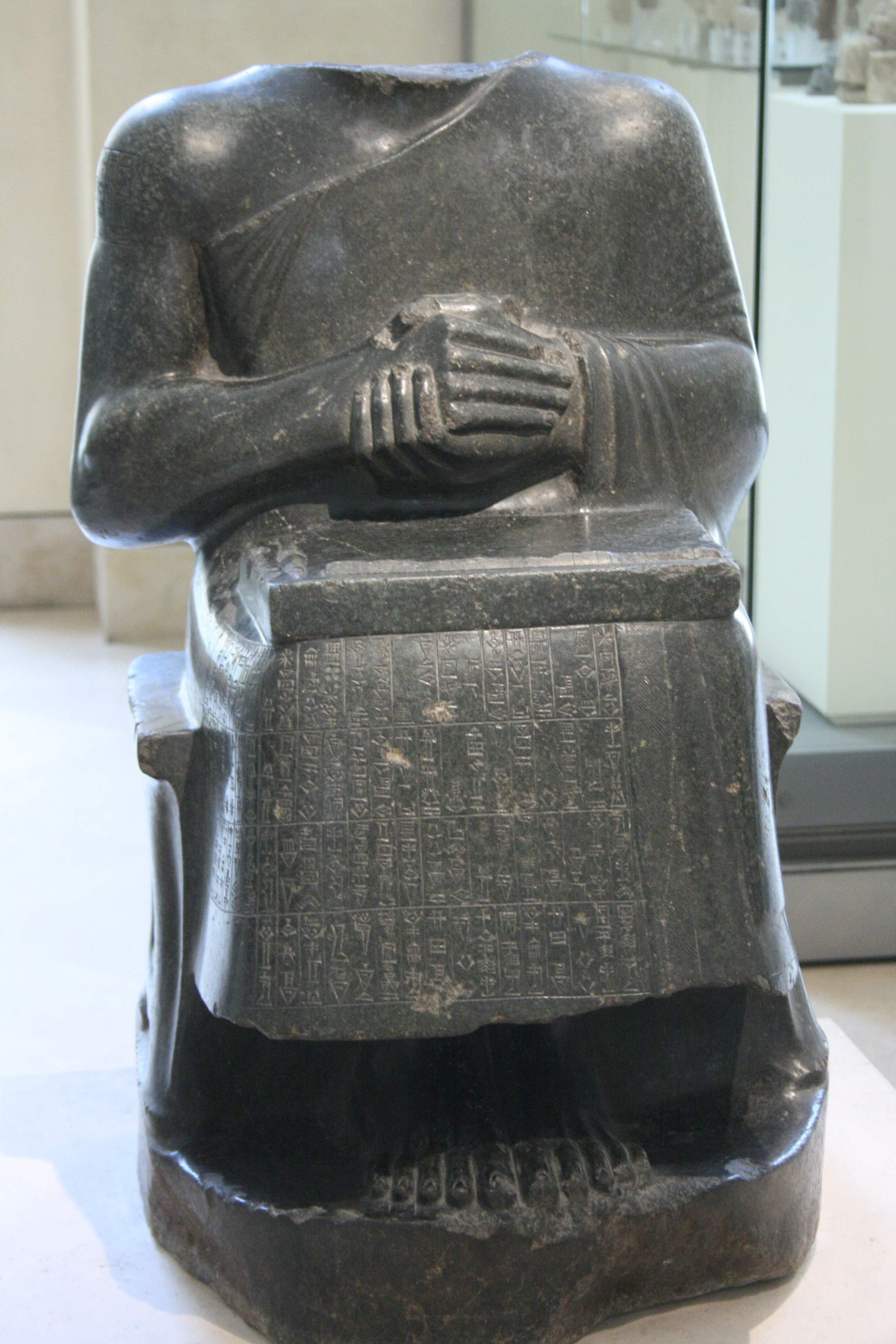 Gudea, prince de Lagash. Statue en diorite dite ""l'architecte à la règle", dédiée à la déesse Gatumdu, v. 2120 av. J.-C (période néo-sumérienne). Musée du Louvre (Paris). Trouvée dans les ruines de Girsu à Tellō (Iraq).